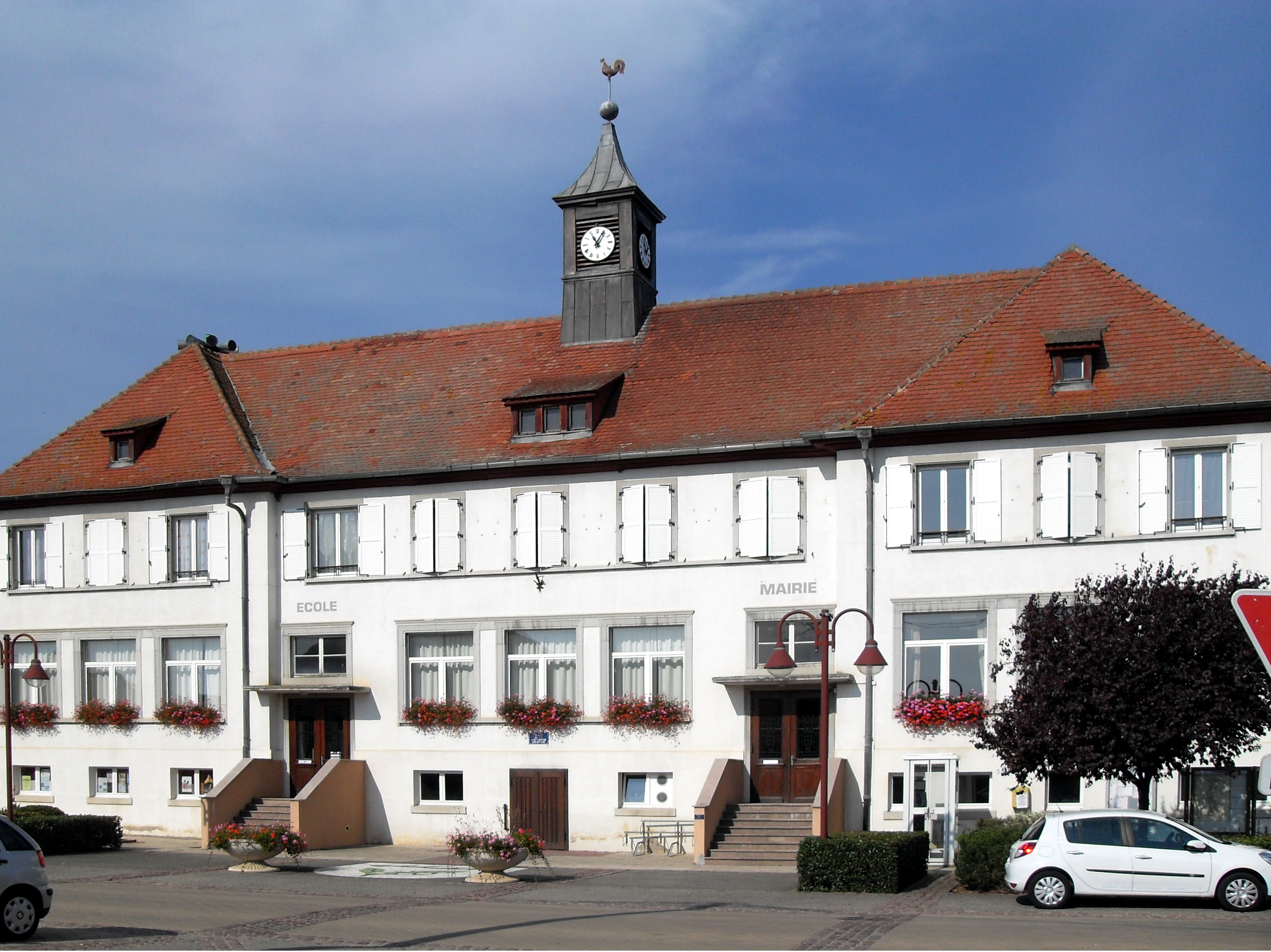 La mairie et l'école d'Appenwihr